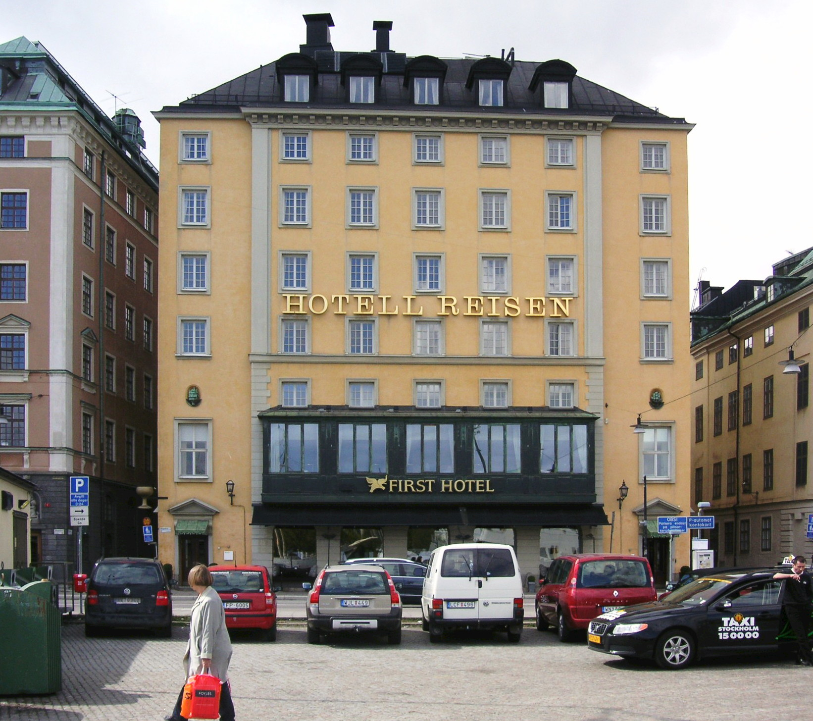 Byggnad "Skeppsbron nr 12-14" i Stockholm